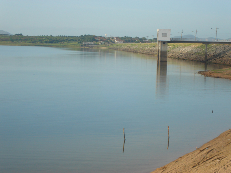 Açude Pereira de Mirando em Pentecoste-CE, Paulo Rogério Sales Santos